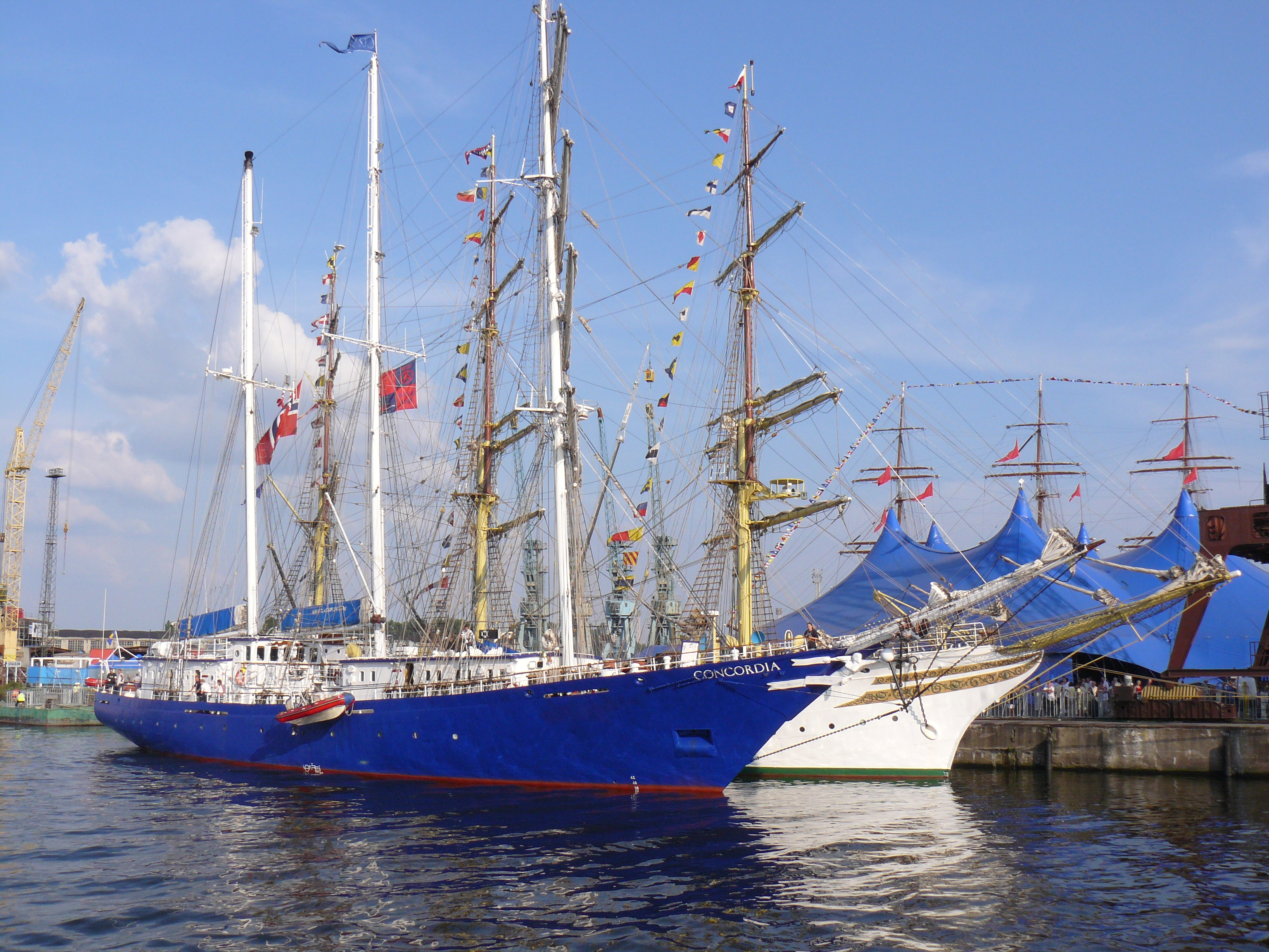 Concordia